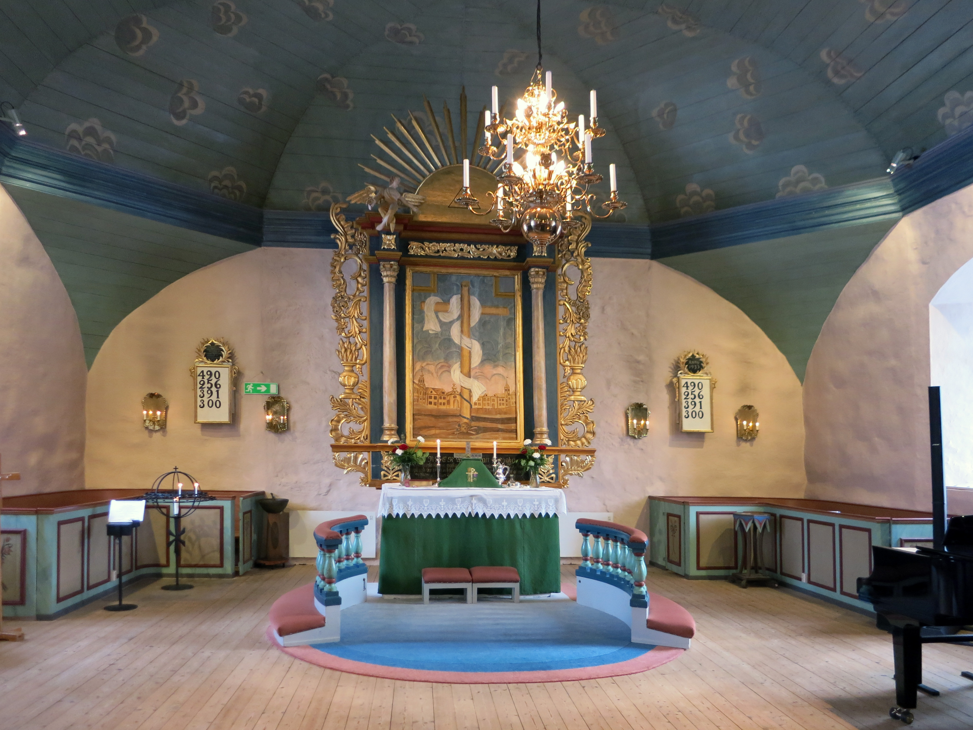 Angereds kyrka. Koret